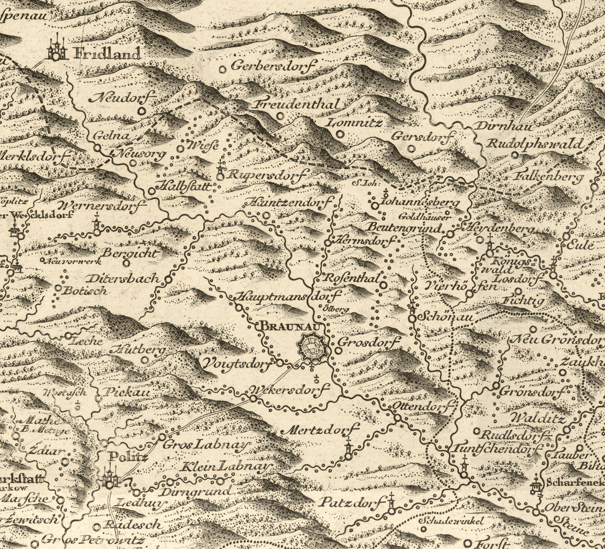 Müllerova mapa Čech z roku 1720, mapový list 10, výřez okolí města Broumov.